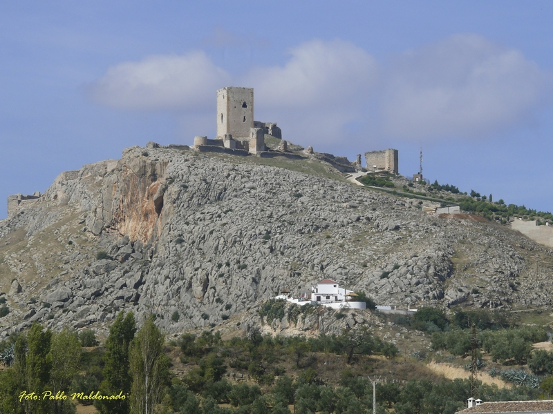 Castillo de origen Fenicio en el que hoy se conservan numerosas murallas.